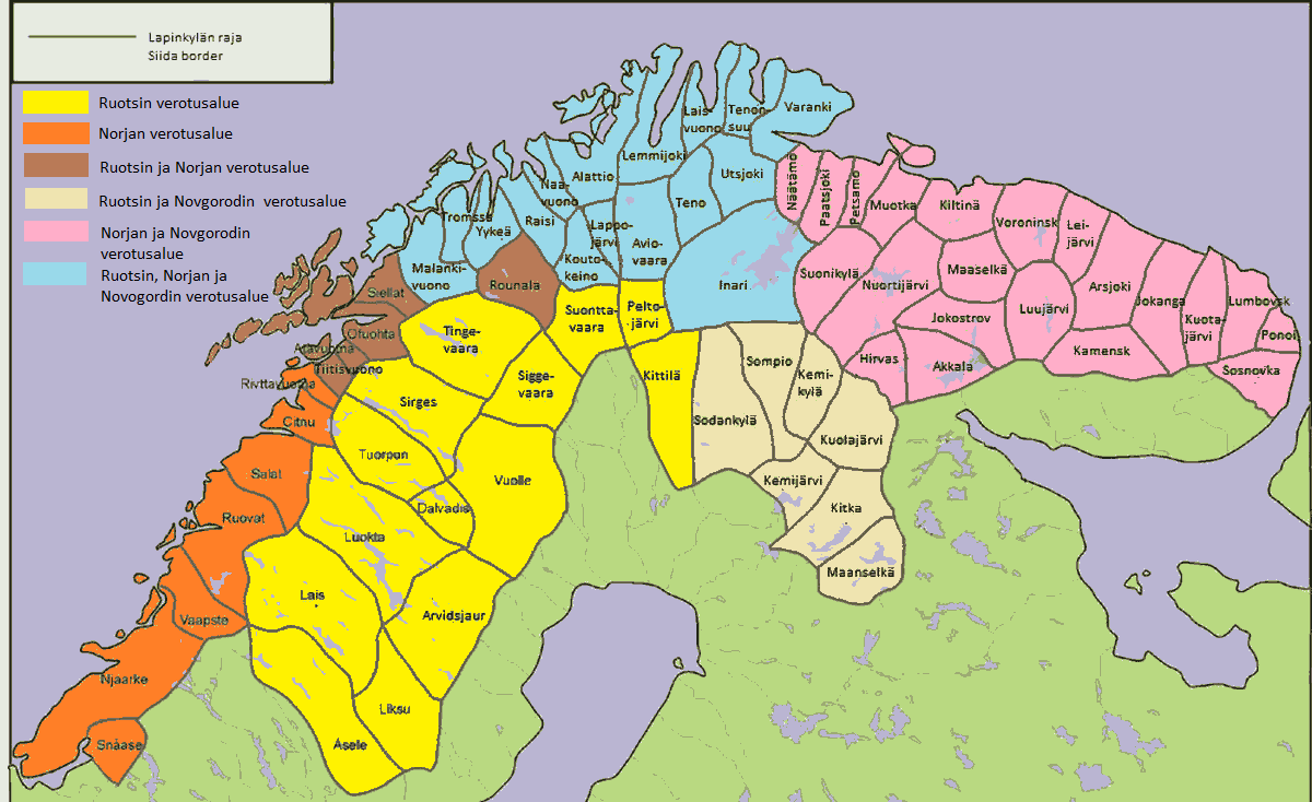 Ruotsin, Norjan ja Novgorodin verotusalueet Lapissa keskiajalla ja uuden ajan alussa.